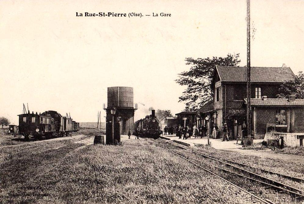 La rame à gauche est un "train-tramway" de la Compagnie du Nord, tractée par une automotrice à vapeur série VV1 à 2 construite par les ateliers de la compagnie en 1901. Elle est placée au centre de la rame pour permettre la marche dans les deux sens. Les compartiments voyageurs sont désaxés par rapport au châssis afin de garantir au mécanicien la visibilité de la voie. Dans la partie basse, les voitures comportent des coffres à bagages.